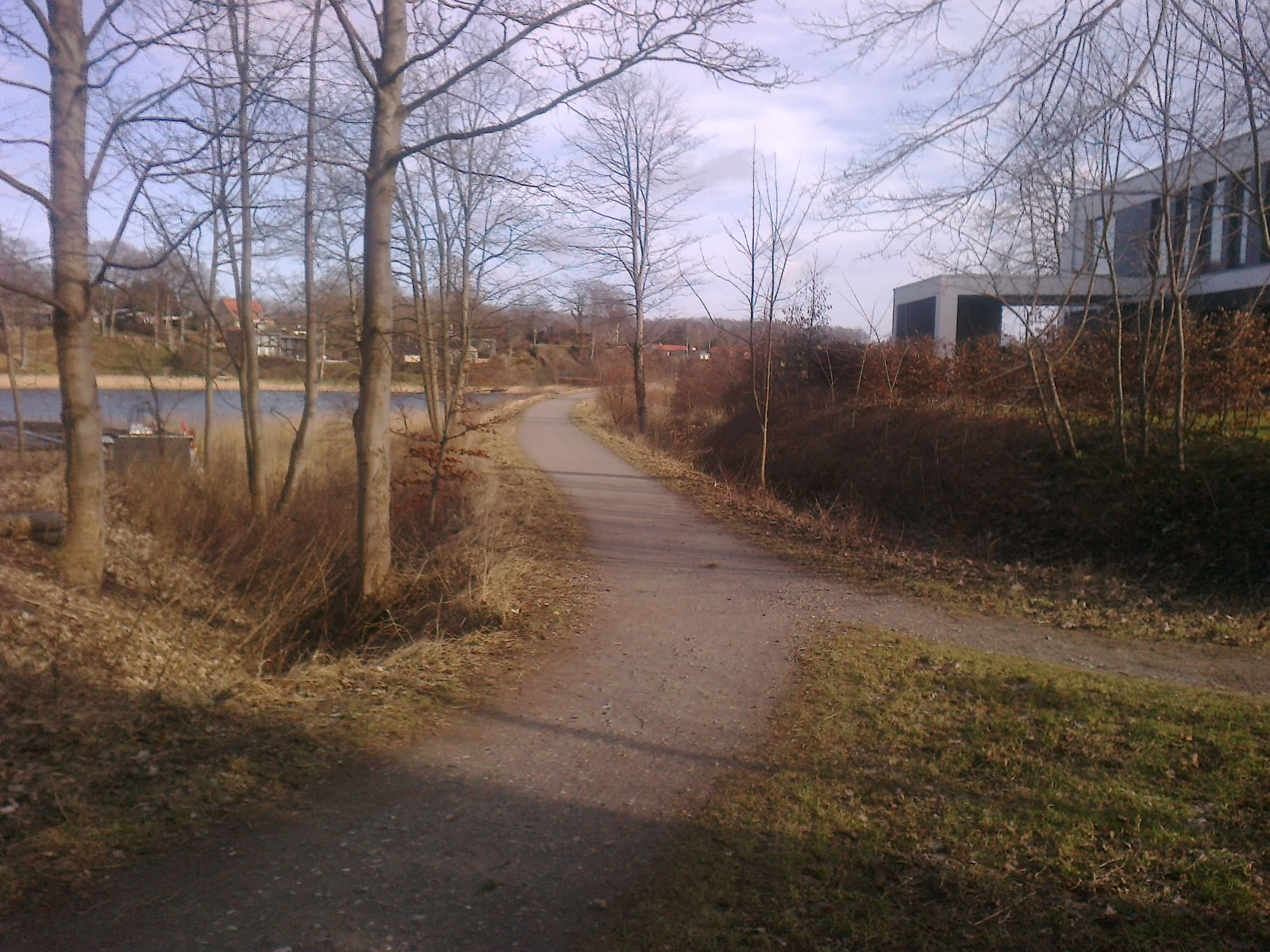 Horsens-Odder banens tracé starter ved Næsset i Horsens - her lå Næsset trinbræt